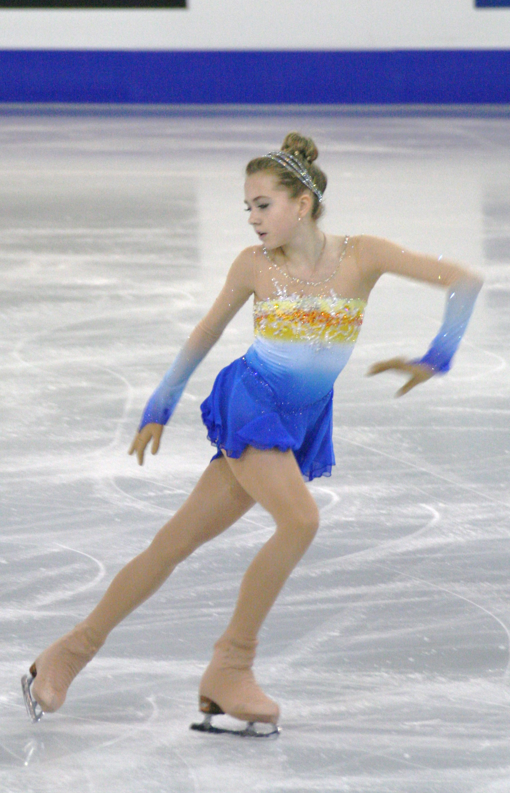 Елена Радионова (Россия) на финале Гран-при по фигурному катанию 2014-2015.